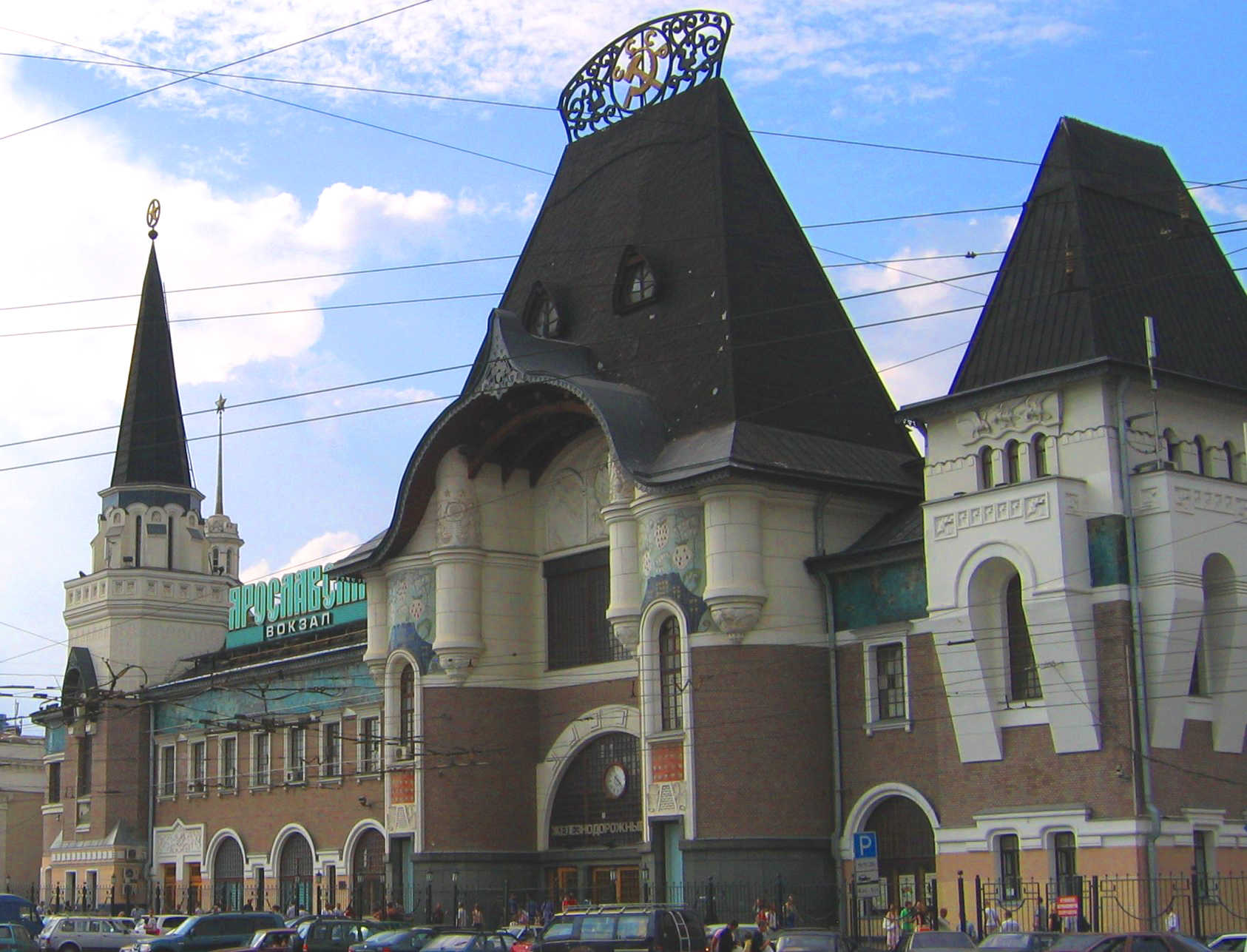 Yaroslavsky_rail_terminal